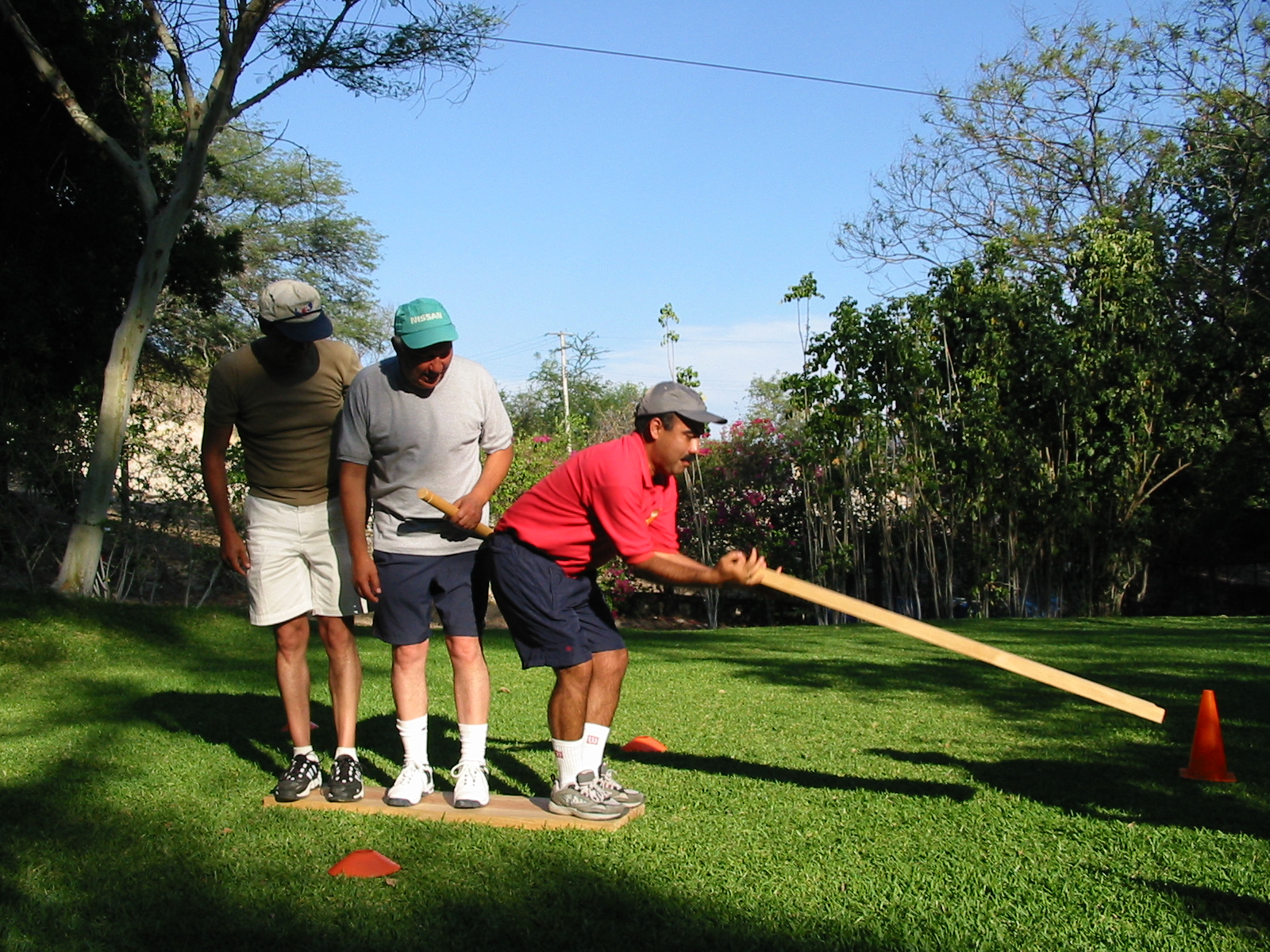 Dinámica de team-building